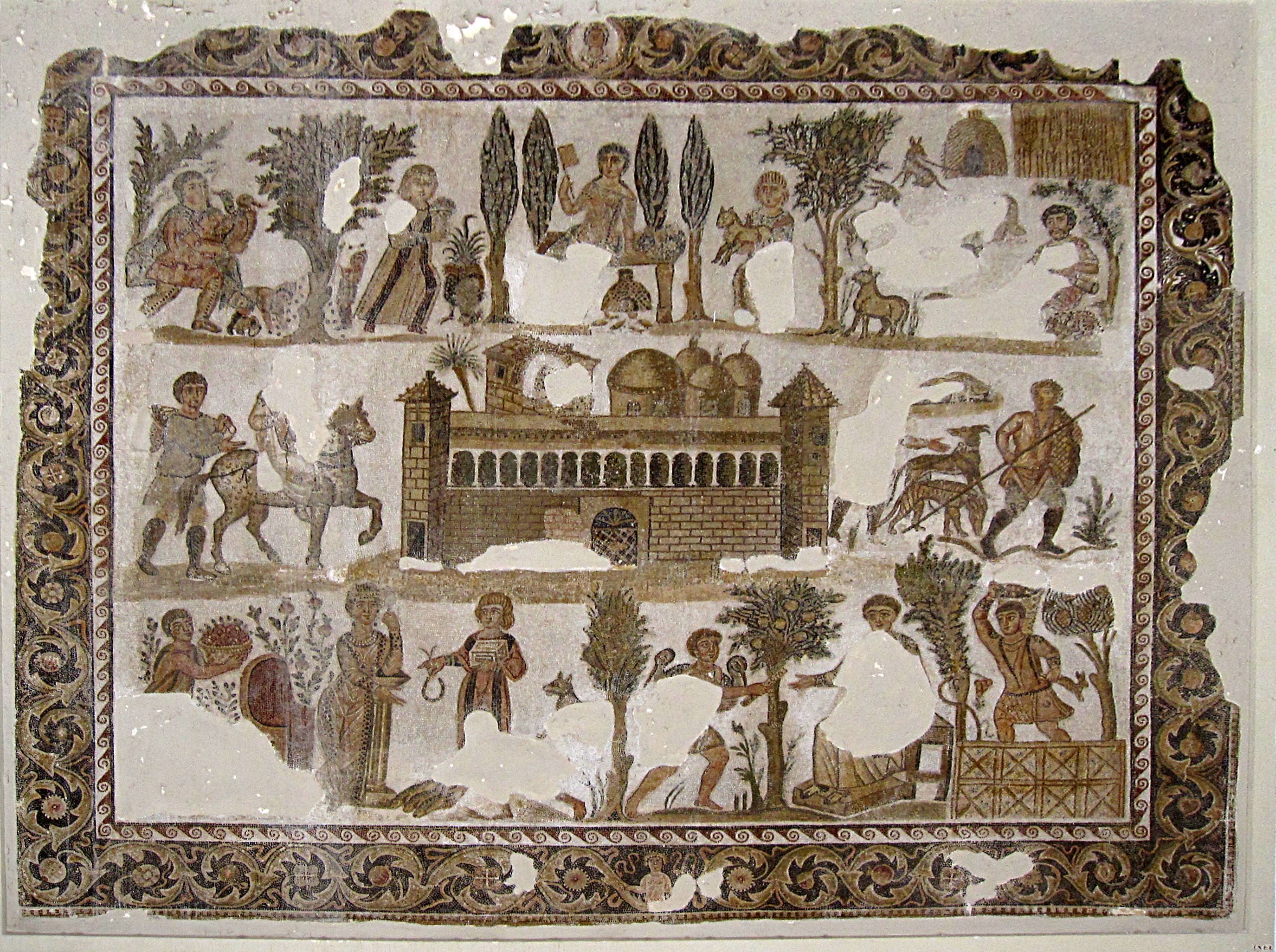 صورة في المتحف الوطني بباردو